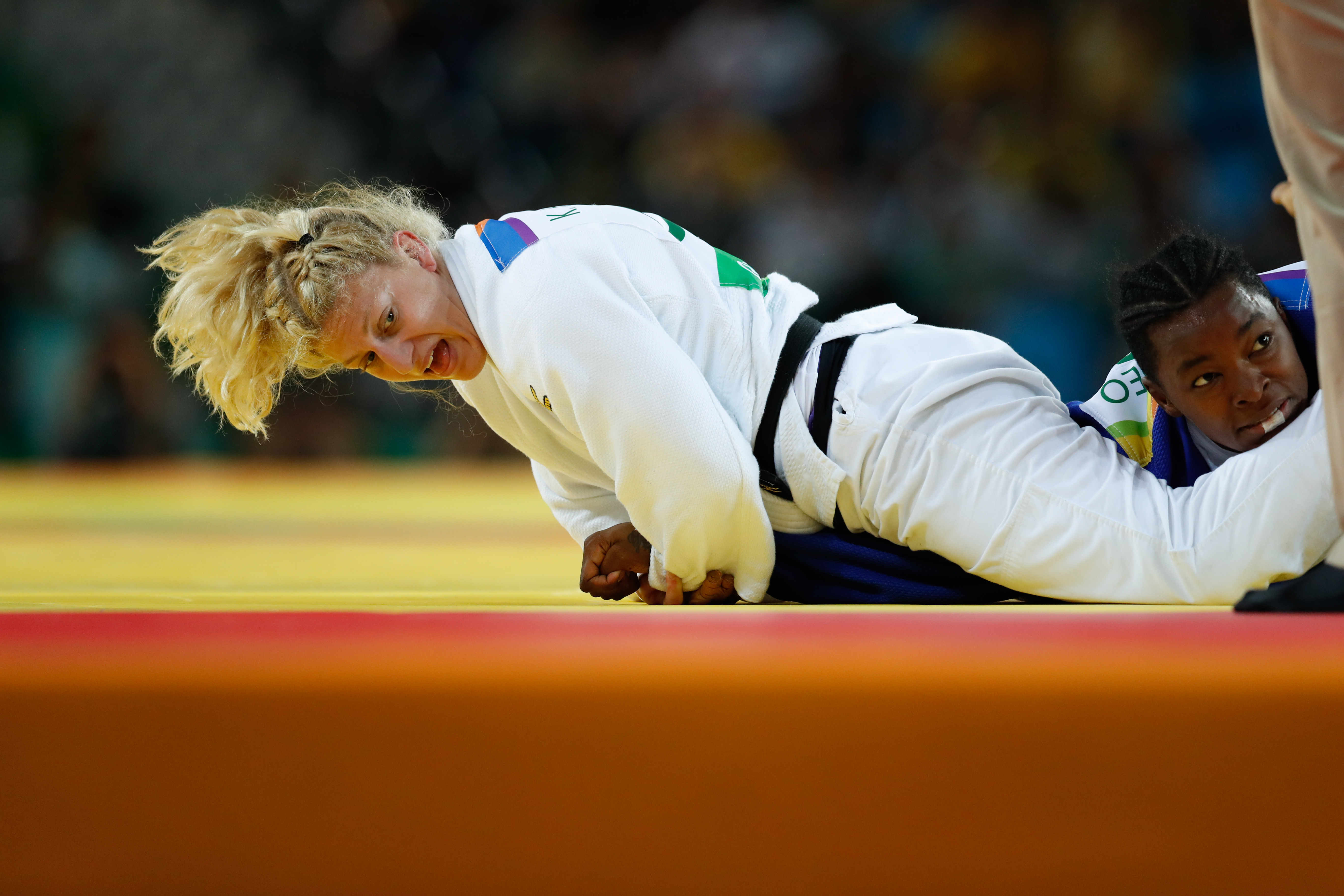 Rio de Janeiro - A judoca norte-americana Kayla Harrison vence a francesa Audrey Tcheumeo na categoria até 78 quilos e ganha medalha de ouro na Rio 2016 (Fernando Frazão/Agência Brasil)